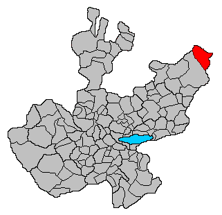 Location of municipio ojuelos de jalisco.